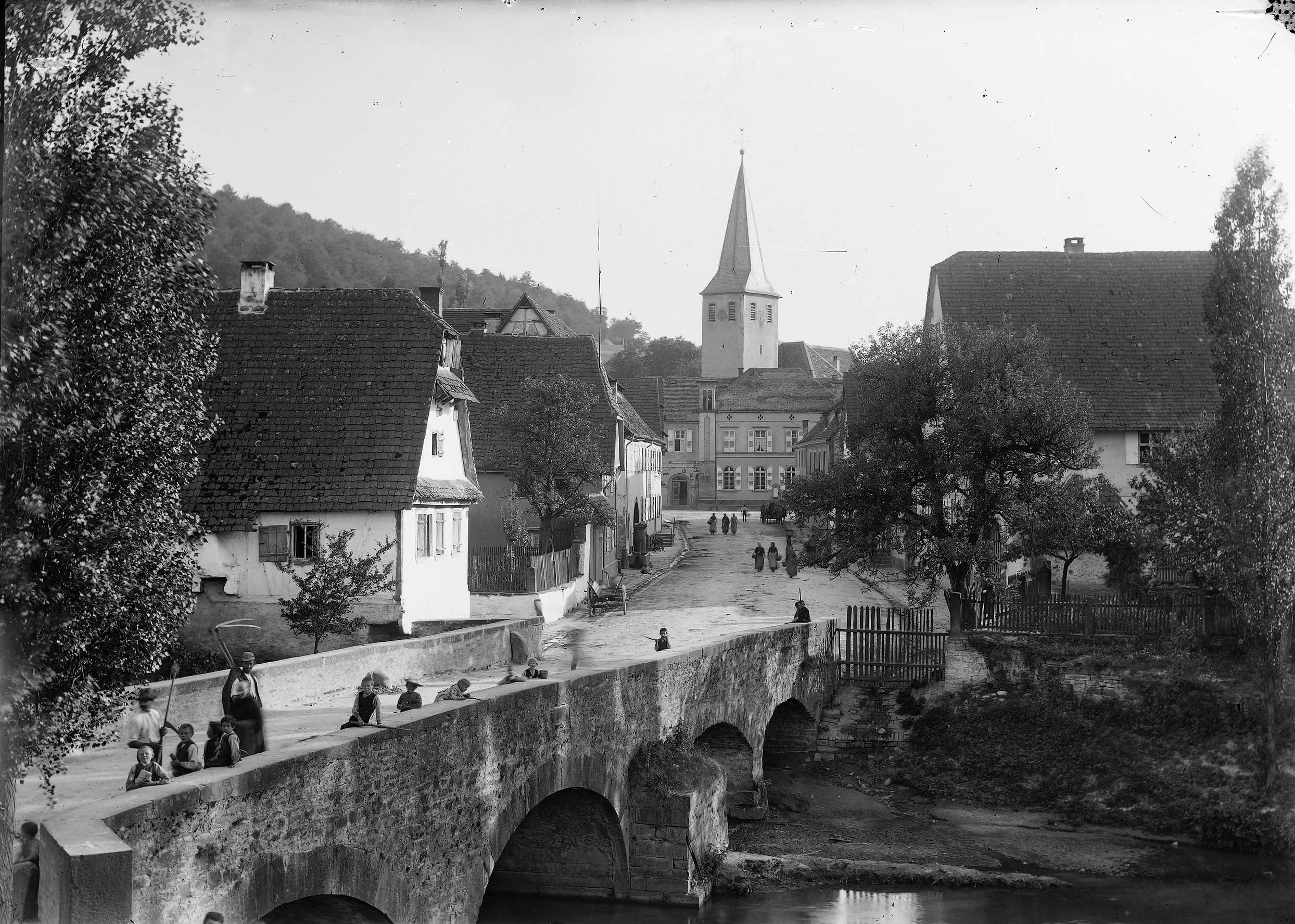 498-1 Glasnegative Wilhelm Kratt (1869-1949) - Landesamt für Denkmalpflege, Außenstelle Karlsruhe / 1. Hälfte 20. Jahrhundert, vor allem 1910-1930 Orte A-Z B Berghausen (KA) Berghausen Brückstraße Dorfansicht mit steinener Brücke über die Pfinz